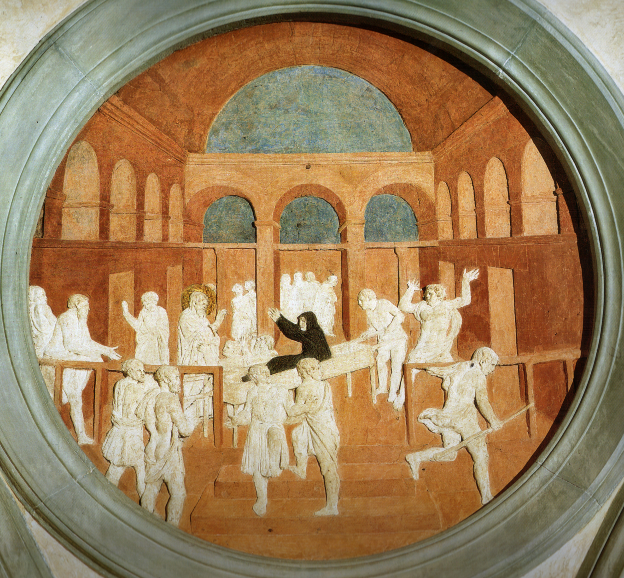 Donatello, storie di san giovanni evangelista, resurrezione di drusiana, 1434-43